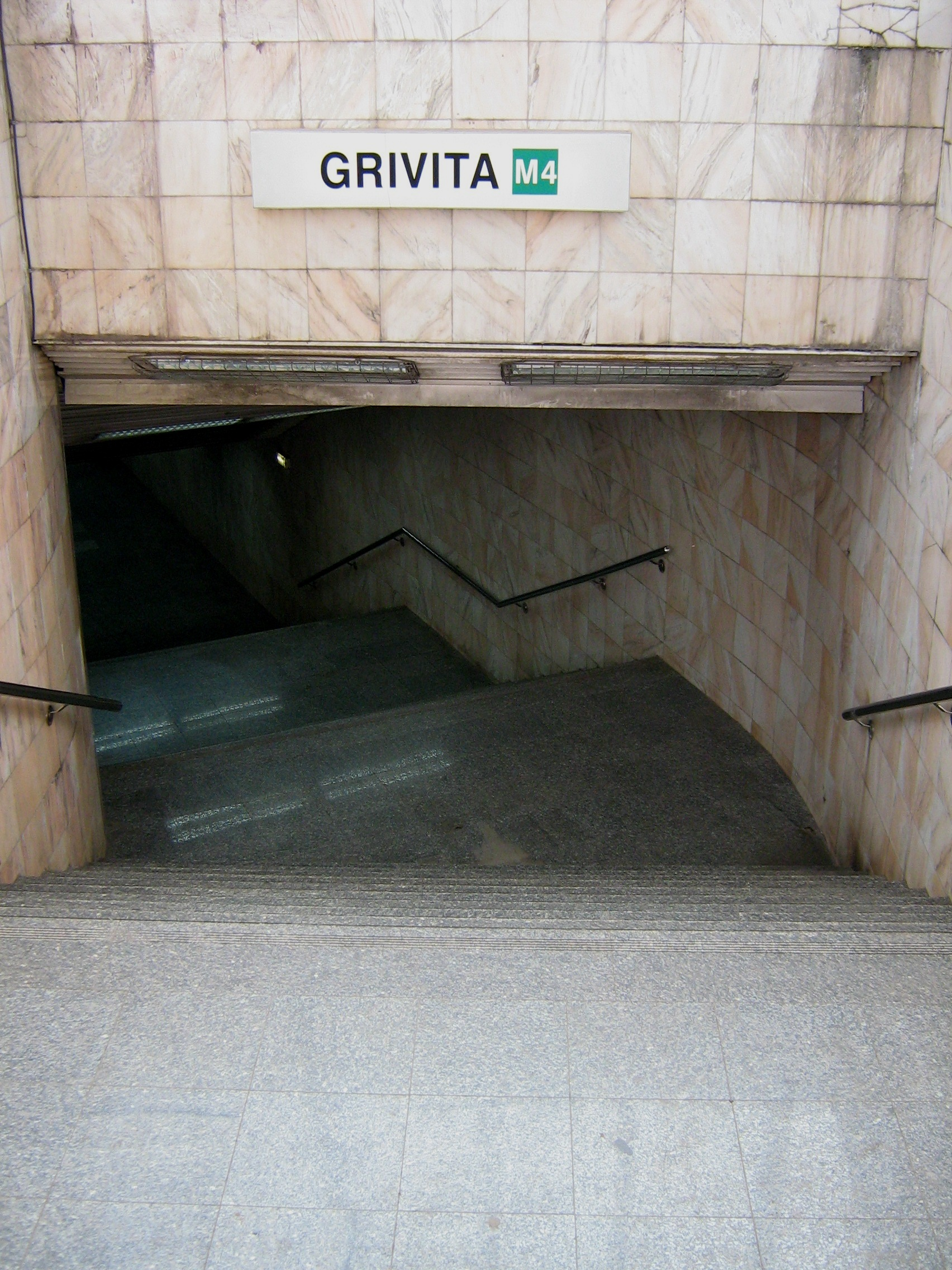 Grivita metro station, Bucharest, Romania.jpg